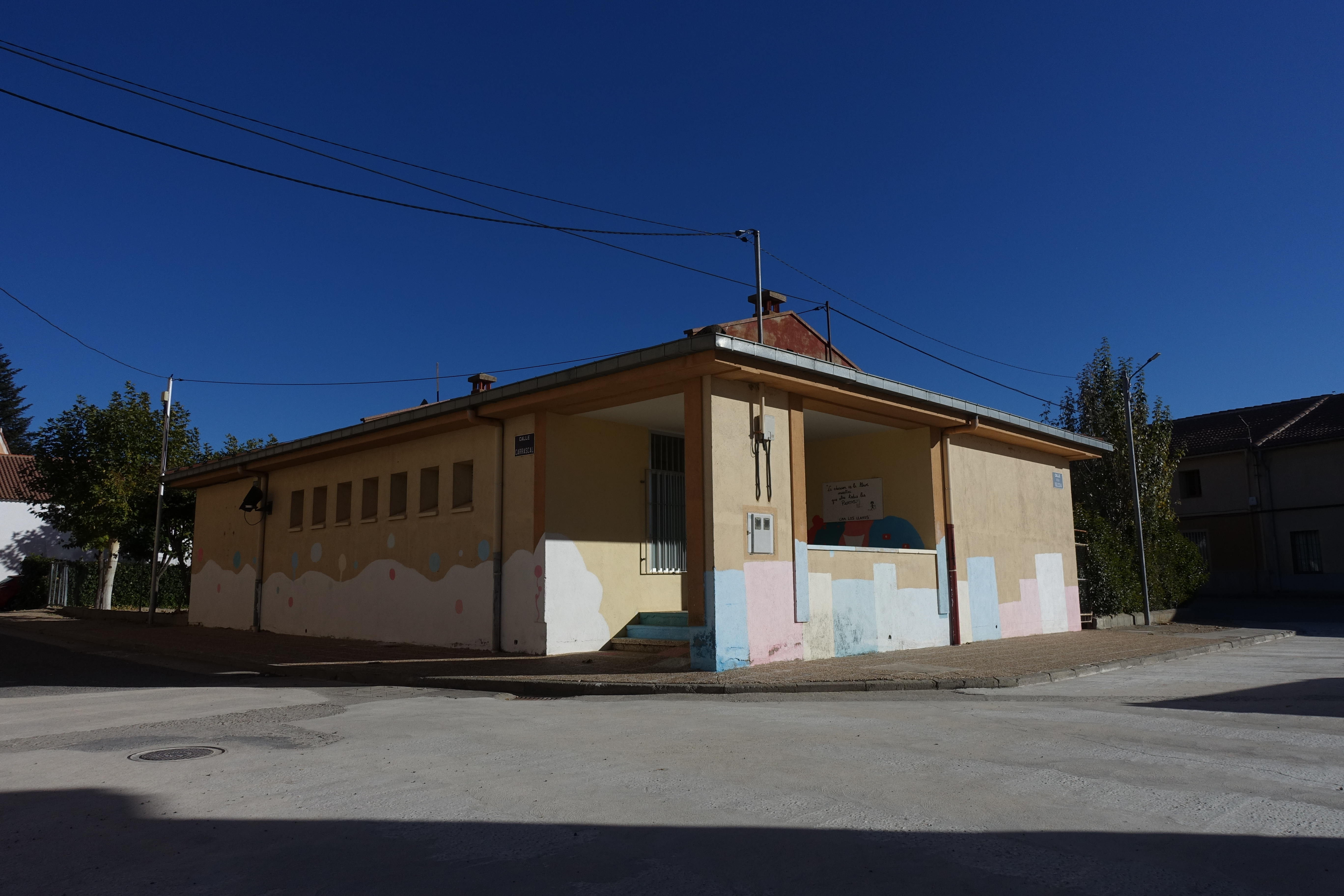 Colegio público de Garcillán (Segovia, España).